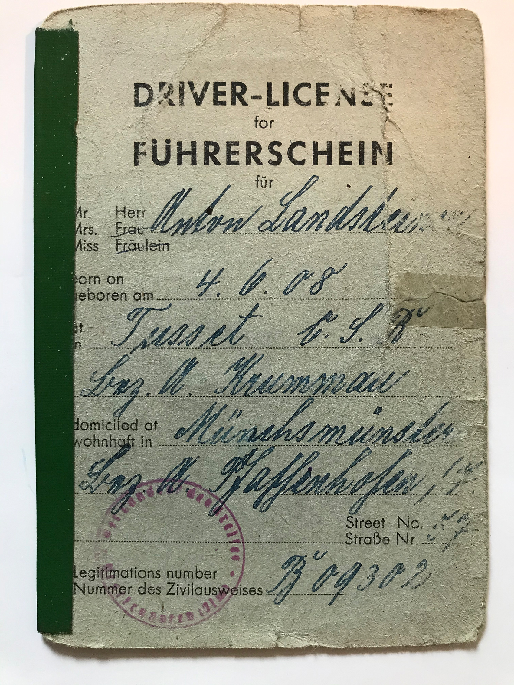 Aussenseite eines Führerschein "Driver-License" BRD in der US-Zone (1948)